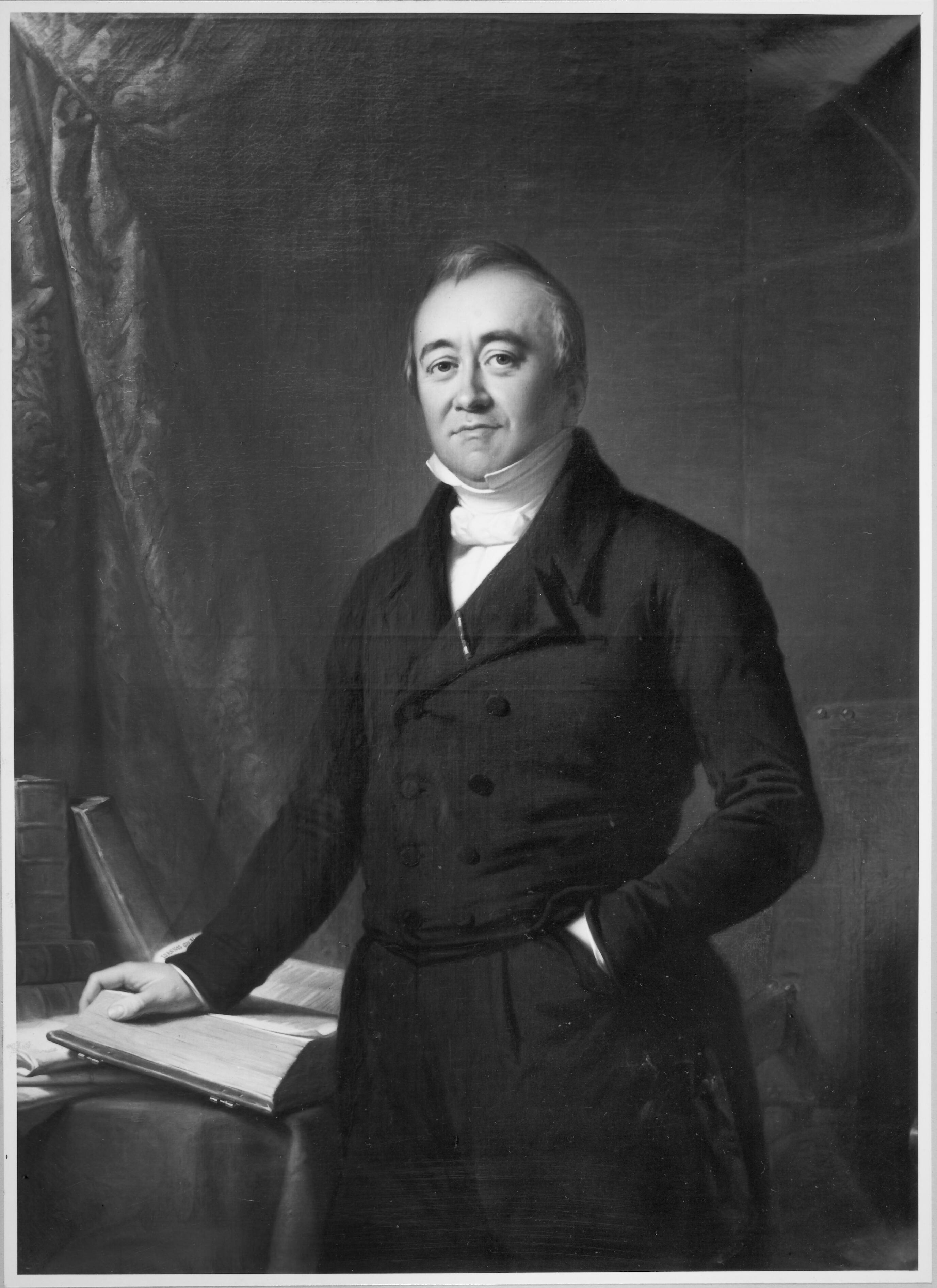 Portret van Pieter Huidekoper (1798-1852)